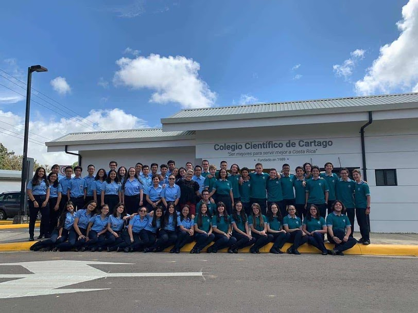 Estudiantes, CCCC, TEC, Costa Rica.